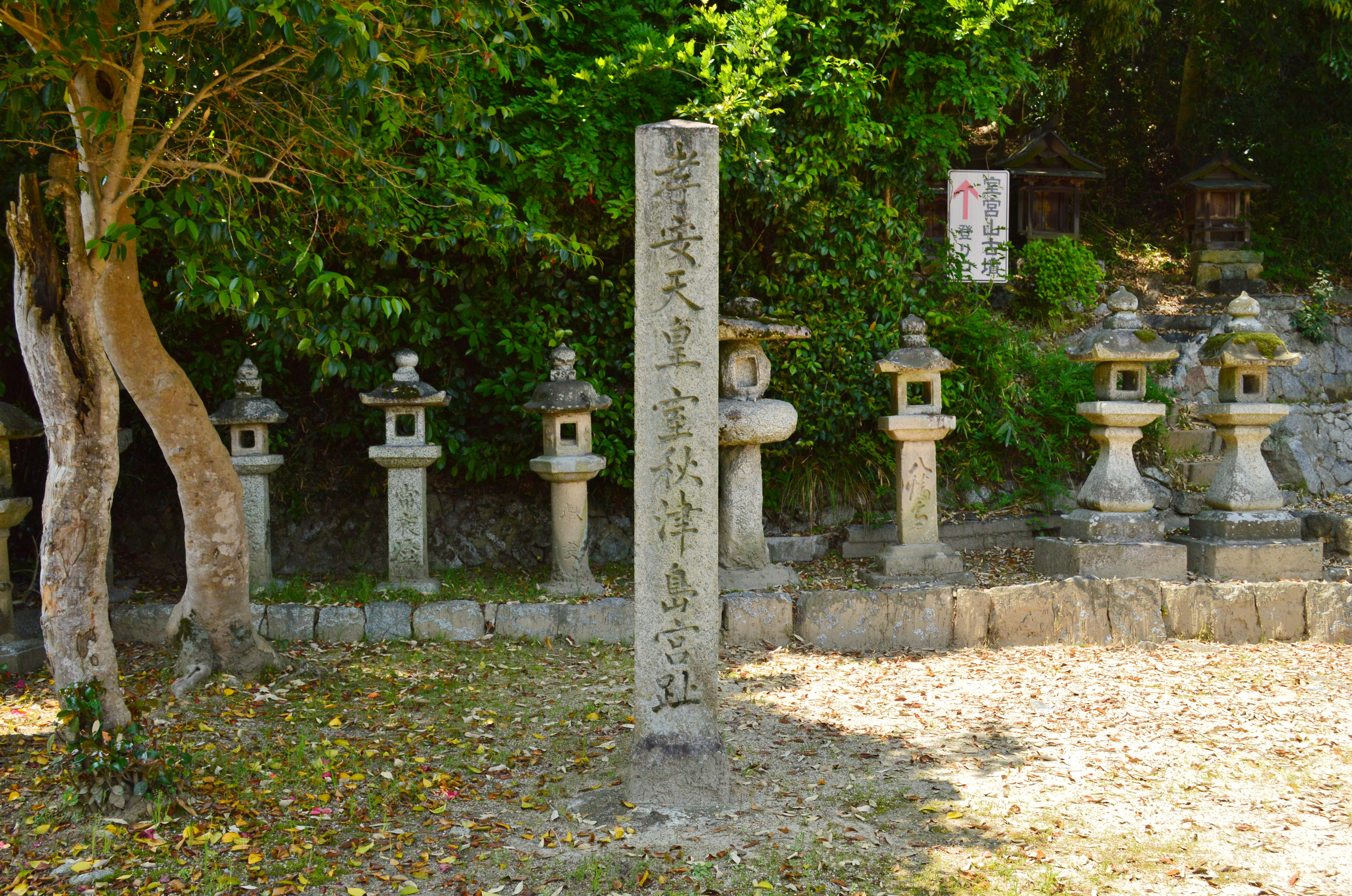 孝安天皇室秋津島宮阯碑